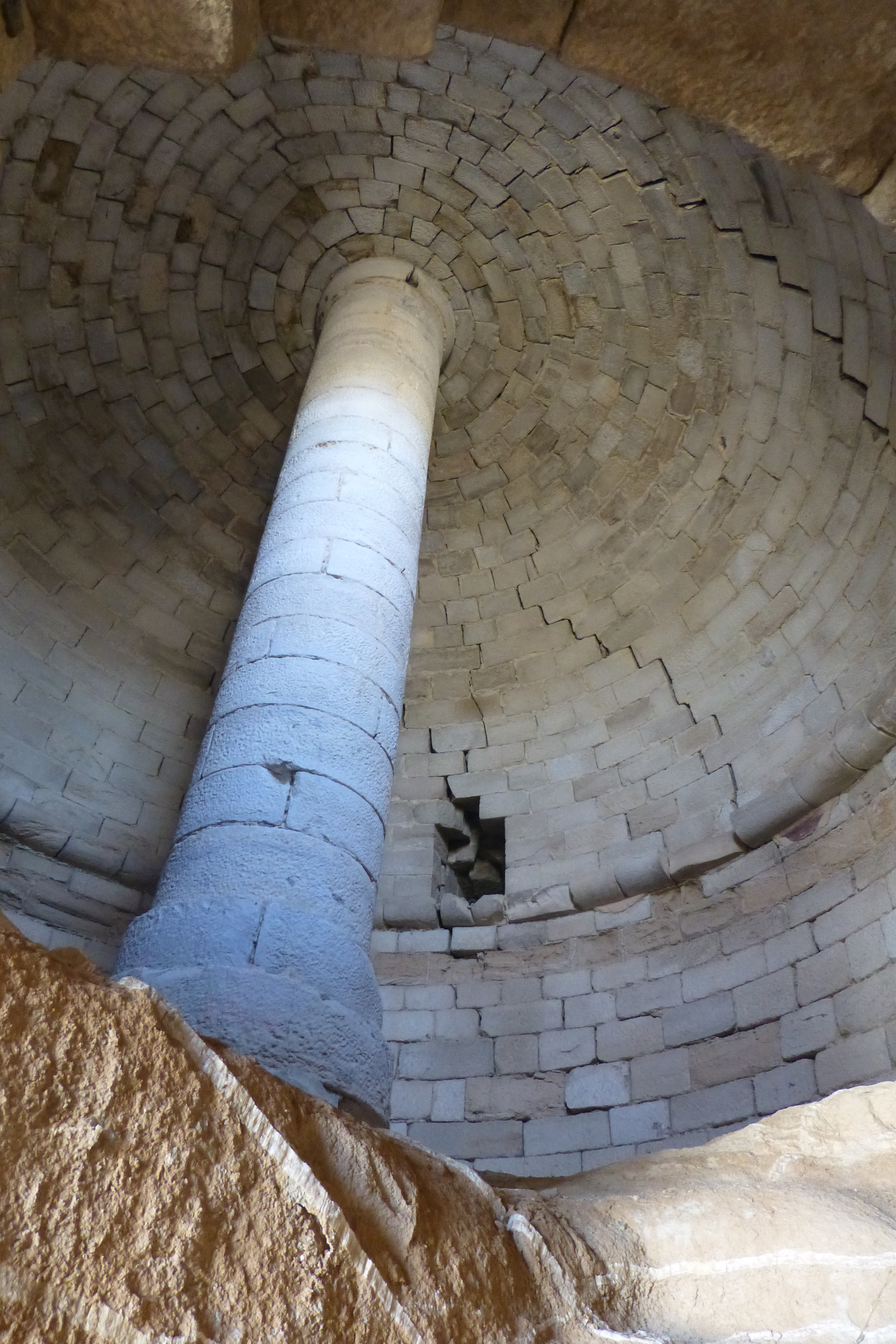 Interior del aljibe que se conserva en el interior de la torre del homenaje del castillo de Ablitas en Navarra (España)